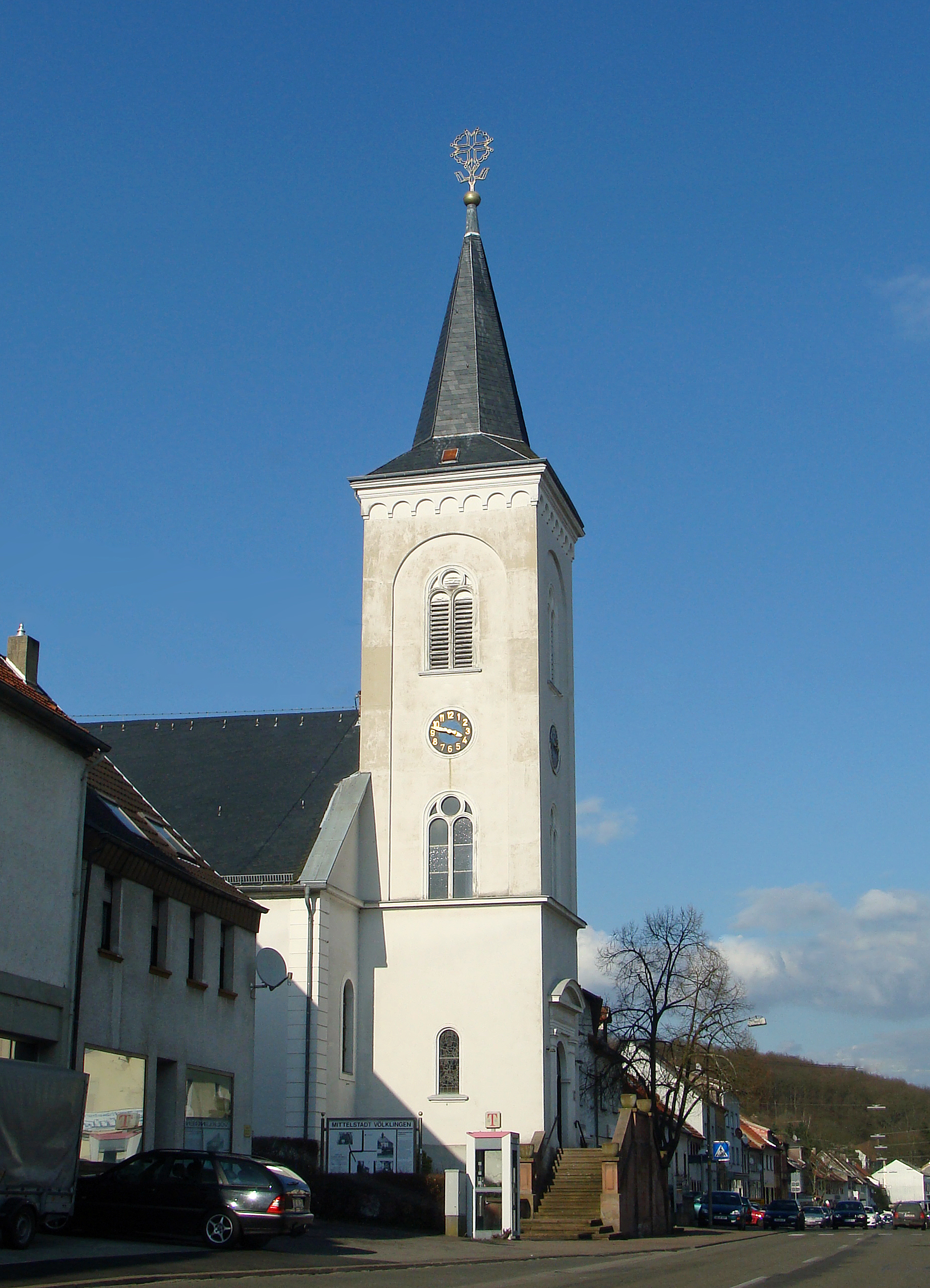 Temple protestant ou église des Huguenots de Ludweiler (Völklingen)